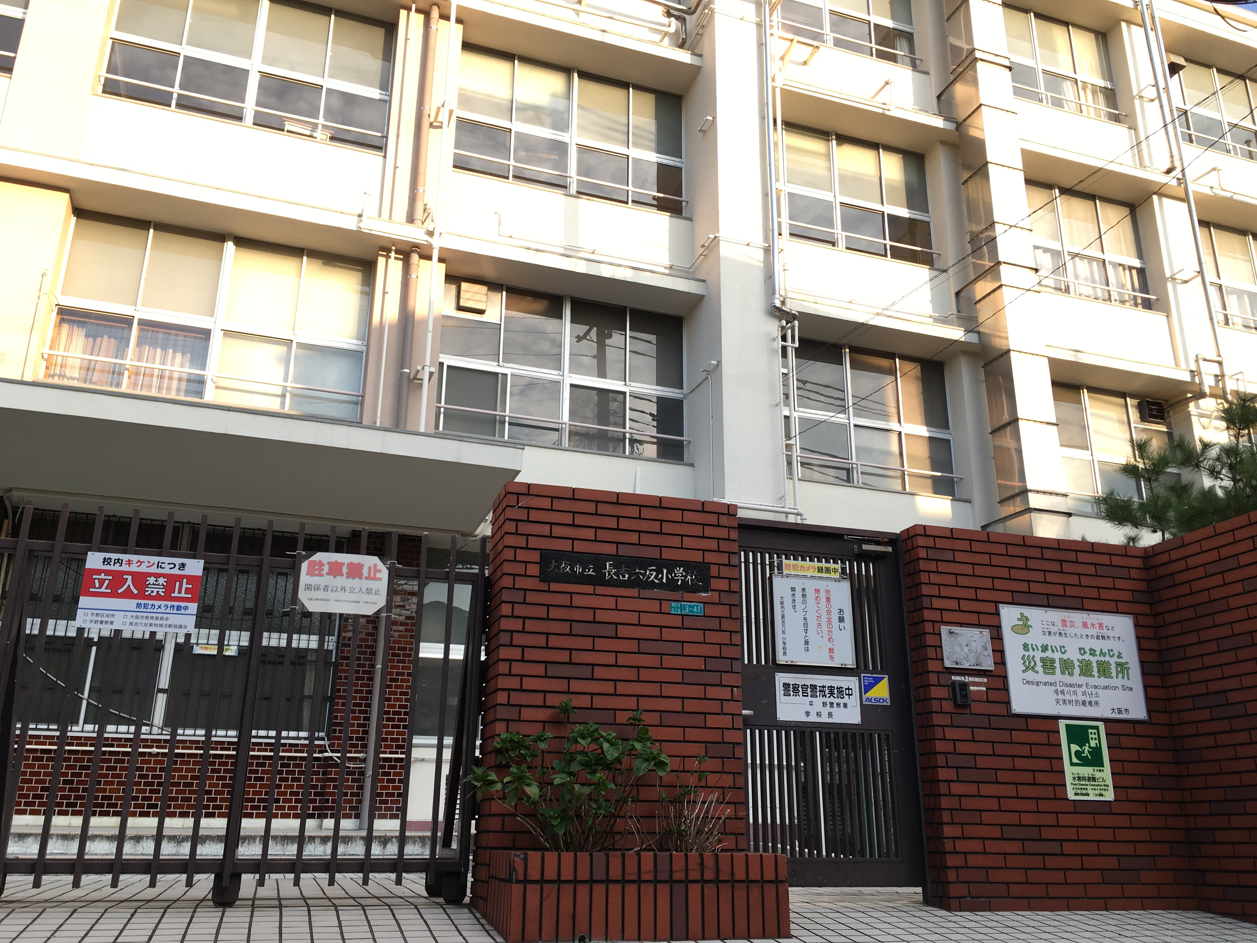 大阪市立長吉六反小学校